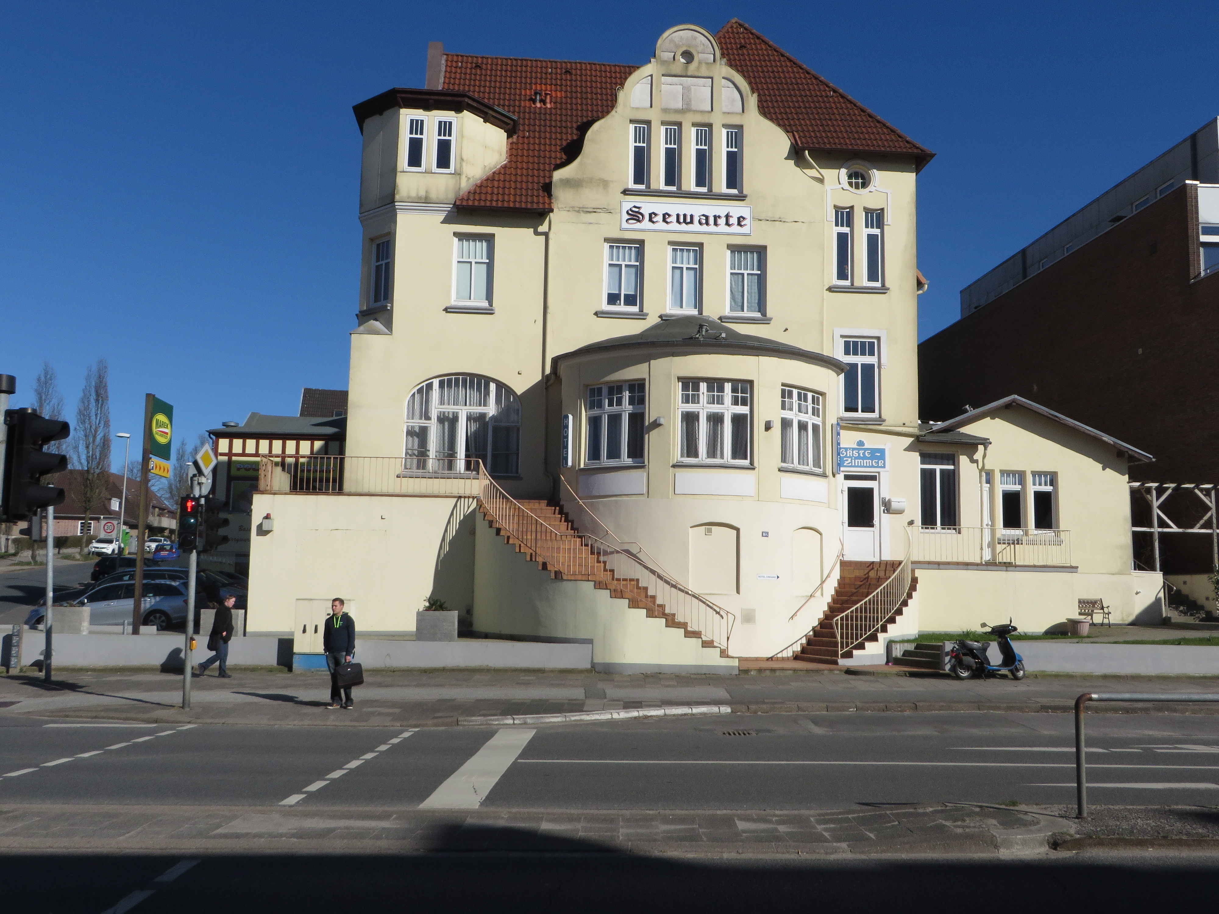 Das Hotel Seewarte (Flensburg-Mürwik am 4 April 2015), Bild 01